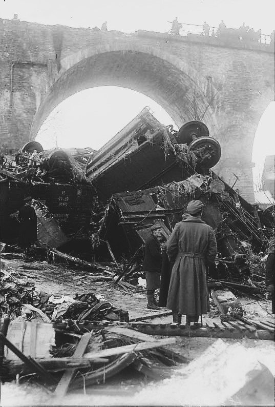 Zu dem großen Eisenbahnunglück auf der Strecke München-Berlin, wo bei Ludwigstadt ein Eilgüterzug mit 20 Wagen den 30 mtr. hohen Viaduckt hinabsauste. Der Schauplatz des Unglücks, im Hintergrund die Brücke, wo der Zug hinabstürzte.